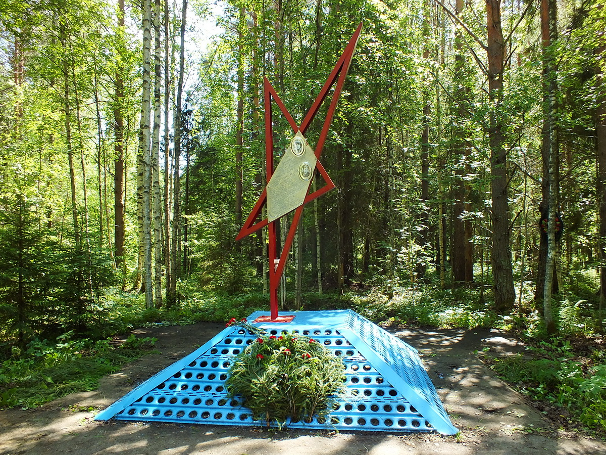 Памятник на месте гибели экипажа Ларионов-Мазур в Краснобаковском р-не Нижегородской области. Открыт 19 октября 1994 года.